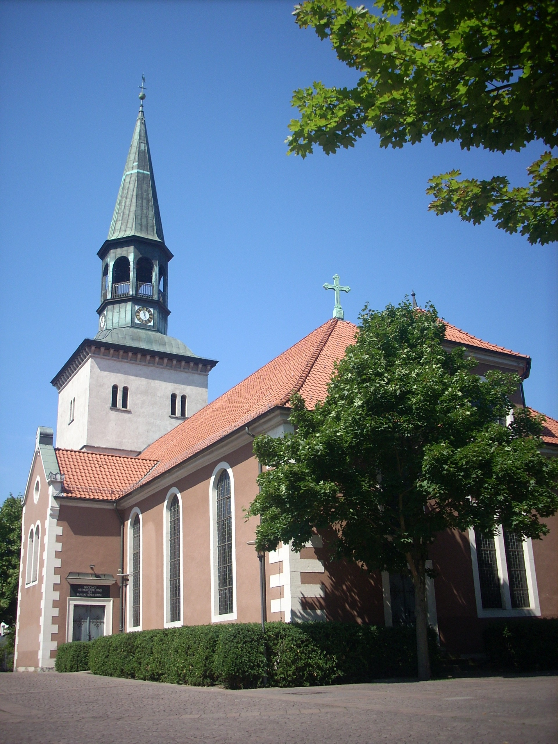 Burgdorf (Region Hannover), Ev.-luth. St.-Pankratius-Kirche